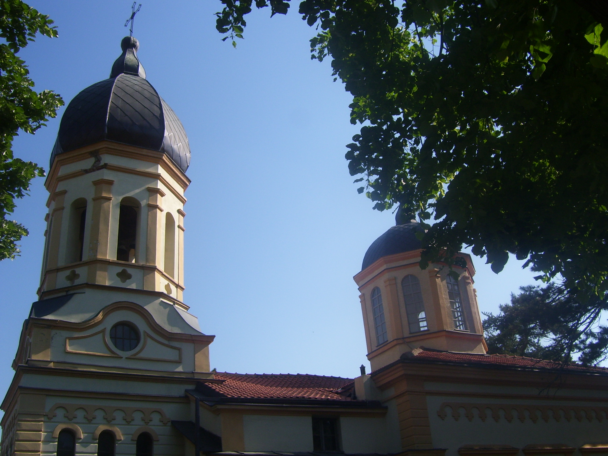 Църквата „Рождество Богородично“ в Цариброд.